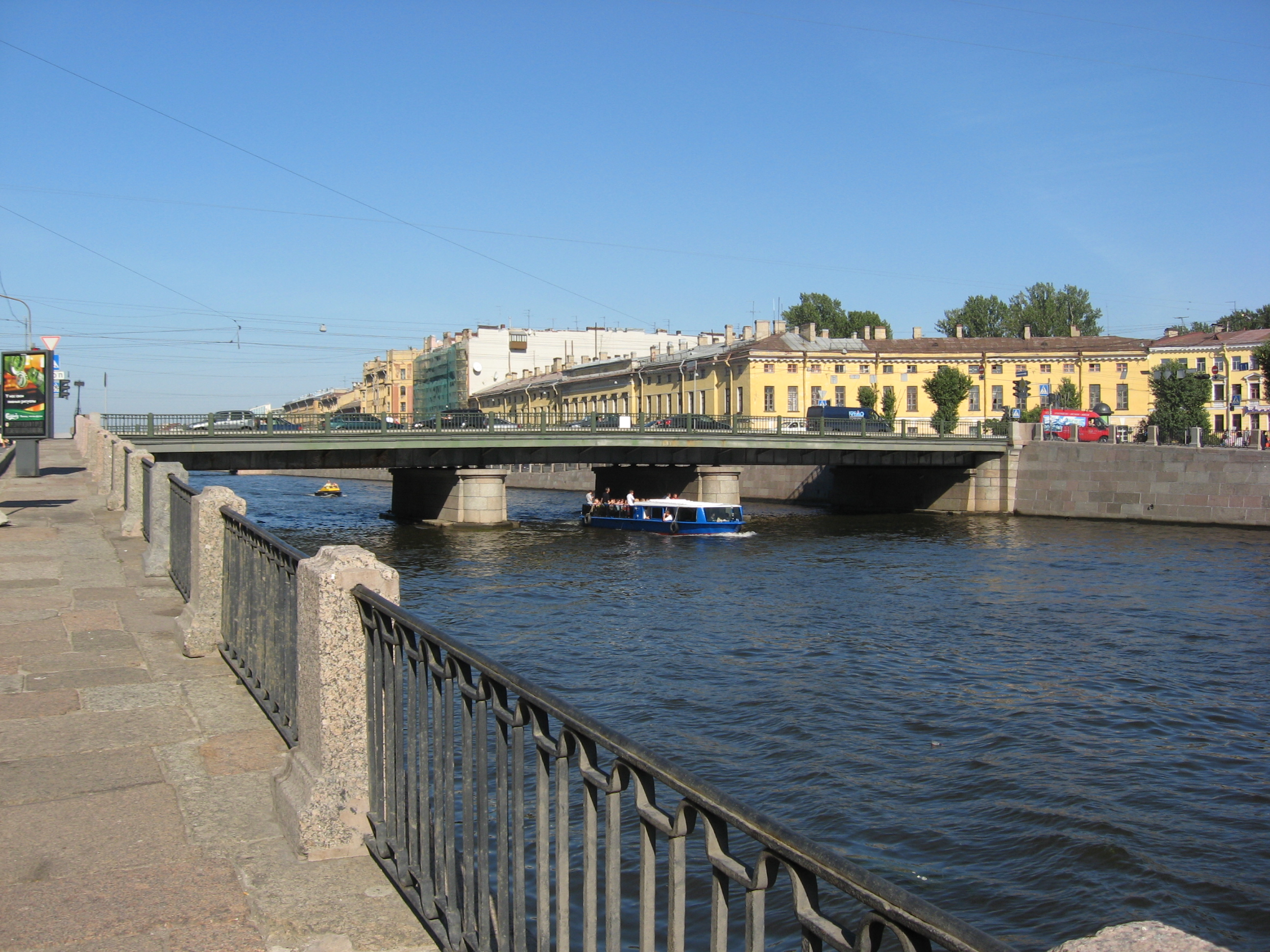 Semyonovsky bridge in Saint-Petersburg